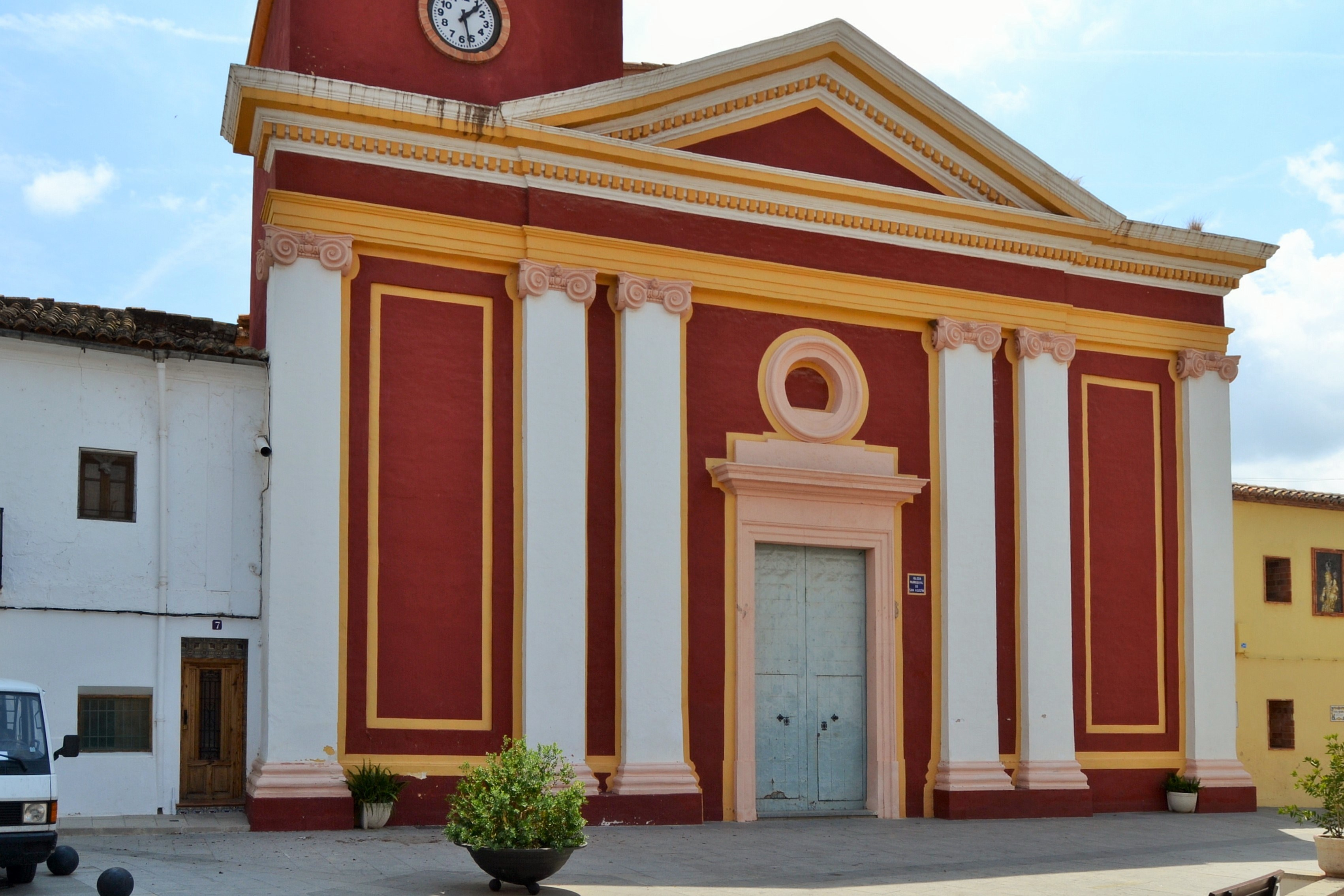 Façana de l'església de sant Agustí d'Alfara de la Baronia.